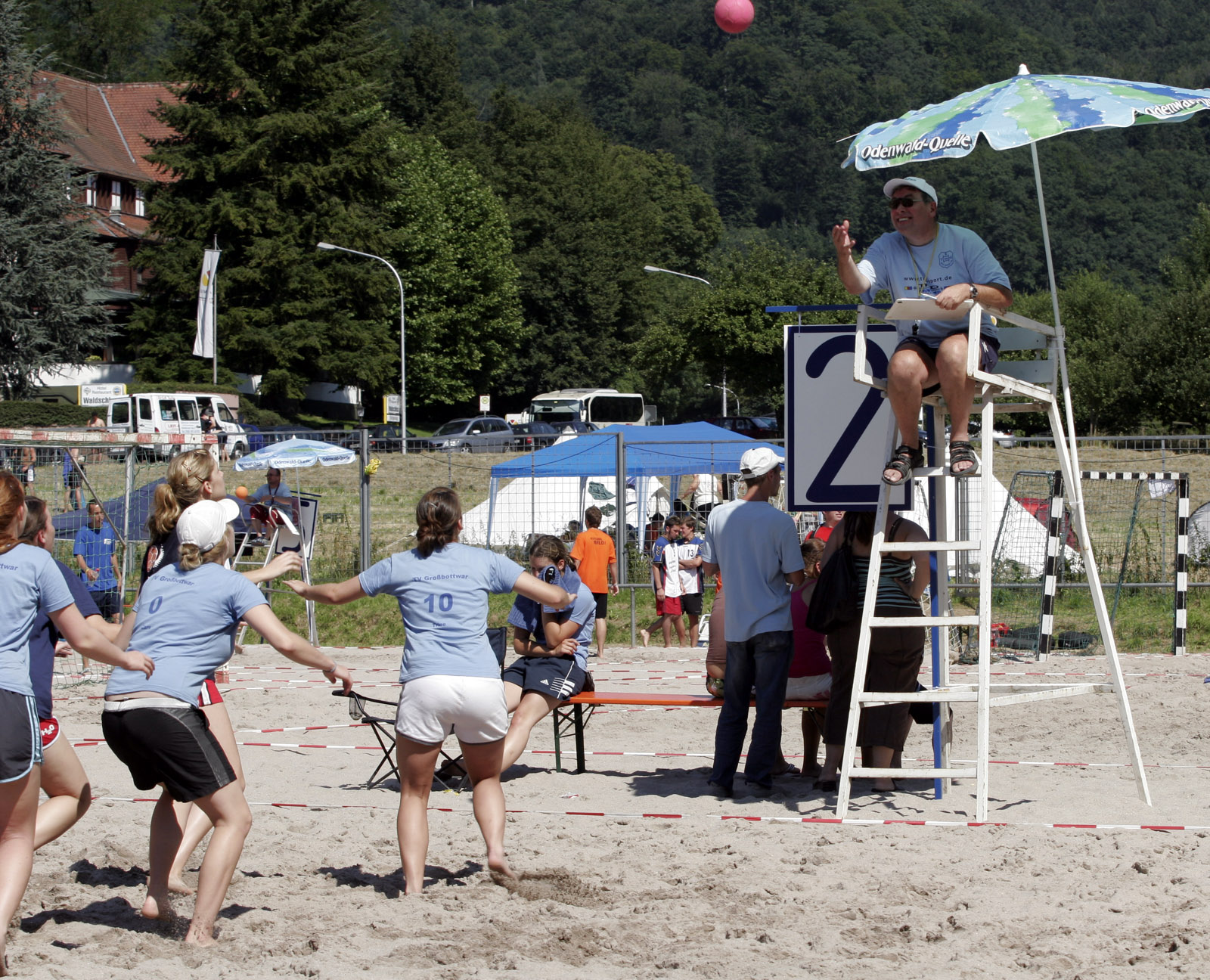 Schiedsrichterwurf ("Anwurf") beim Beachhandball. Aufgenommen beim Beachhandballturnier in Weinheim 2007